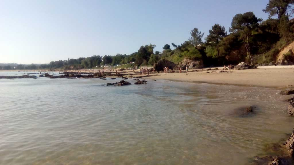 Praia do Raso, Ares.